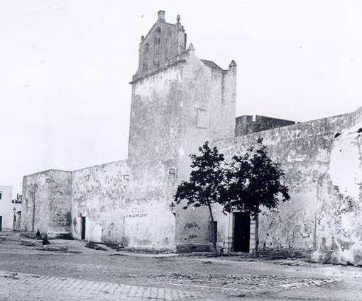 Castillo San Romualdo de San Fernando (Cádiz)